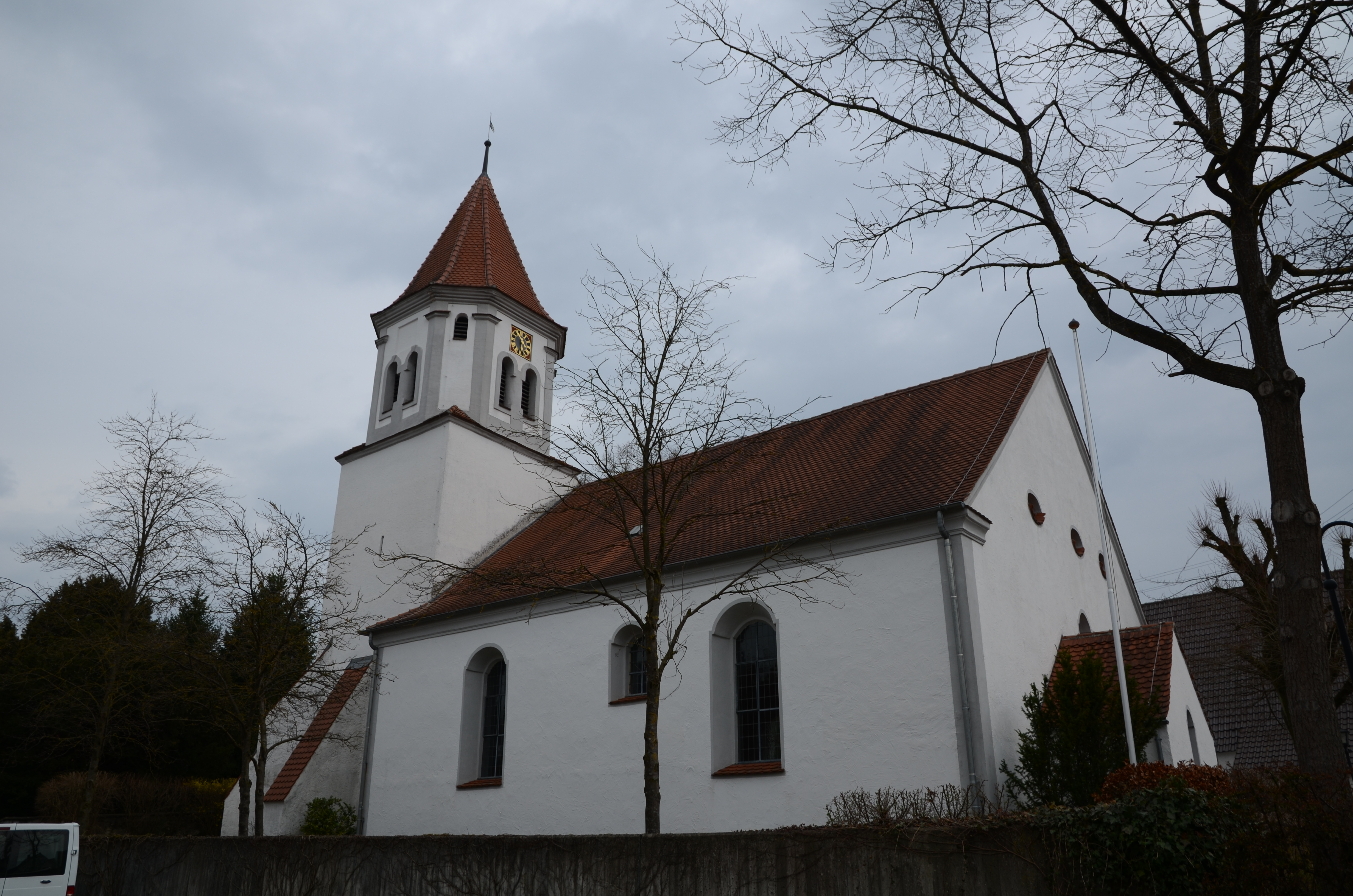 evang.-luth. Nikolaikirche in Bächingen an der Brenz